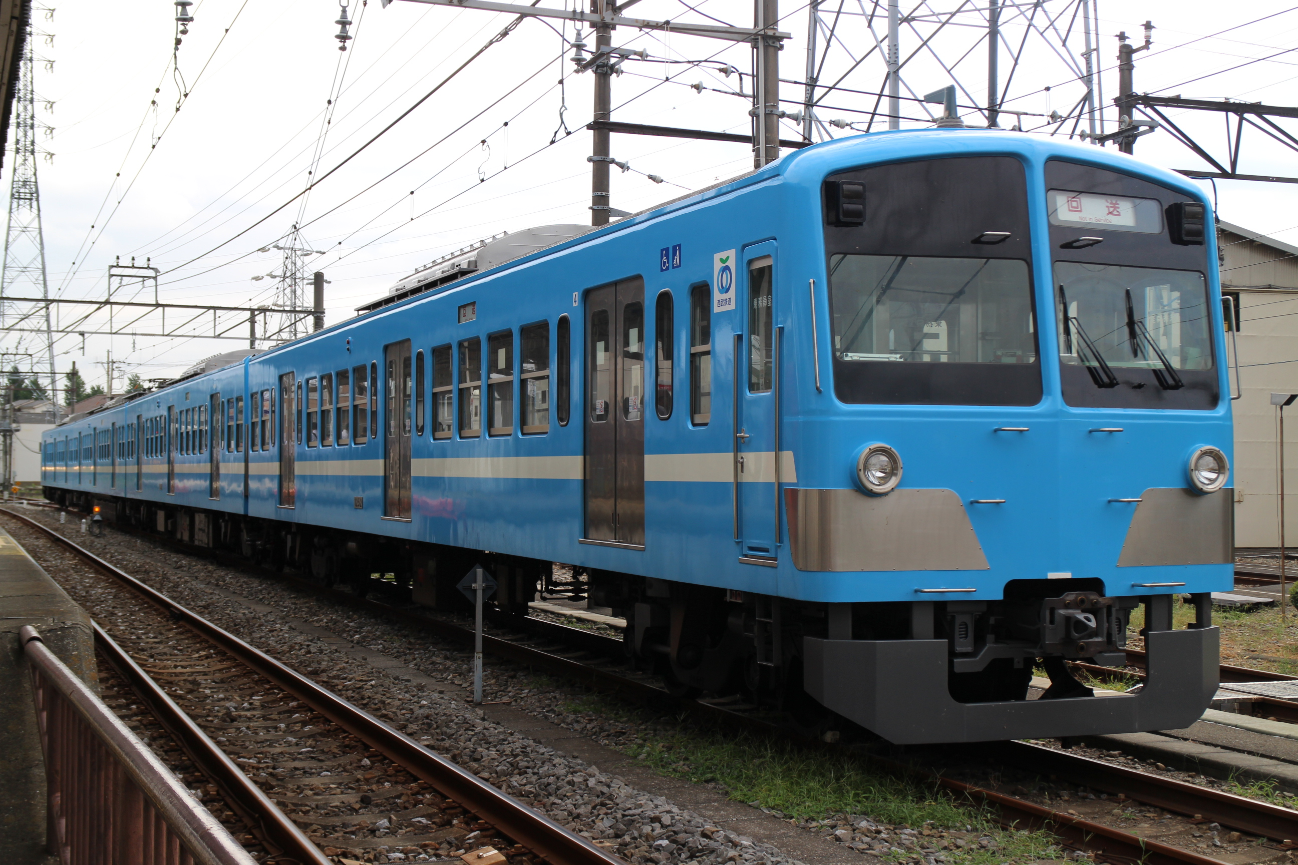 西武101系電車/近江鉄道「湖風号」塗色